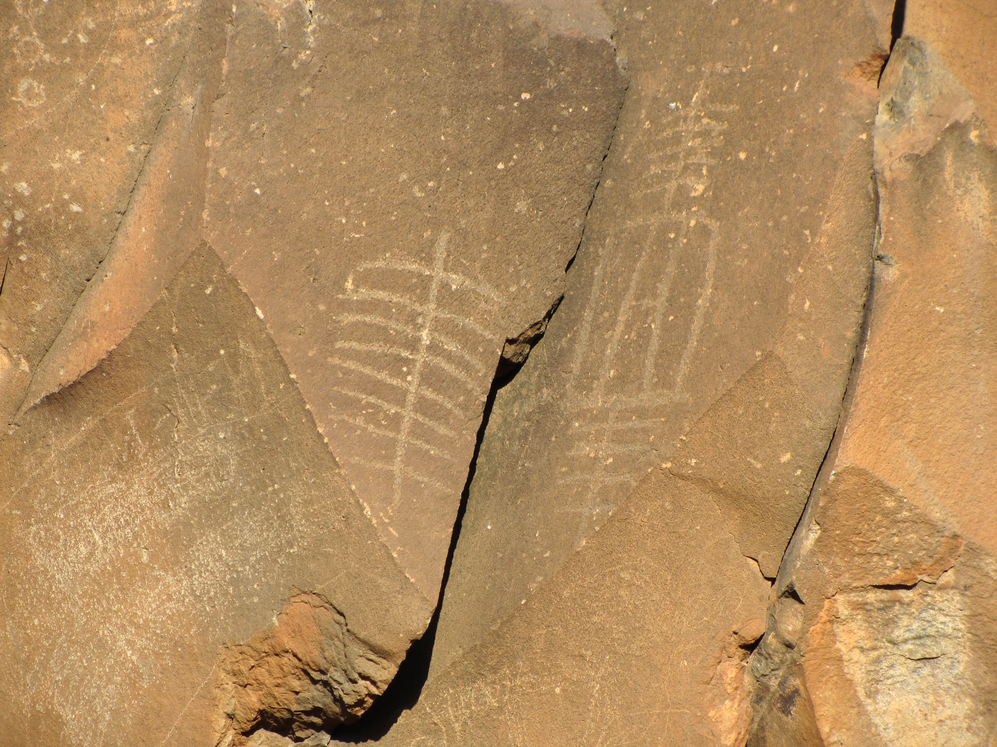 Grabados rupestres del barranco de Balos, Agüimes, Gran Canaria.